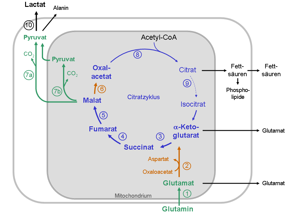 Glutaminolyse